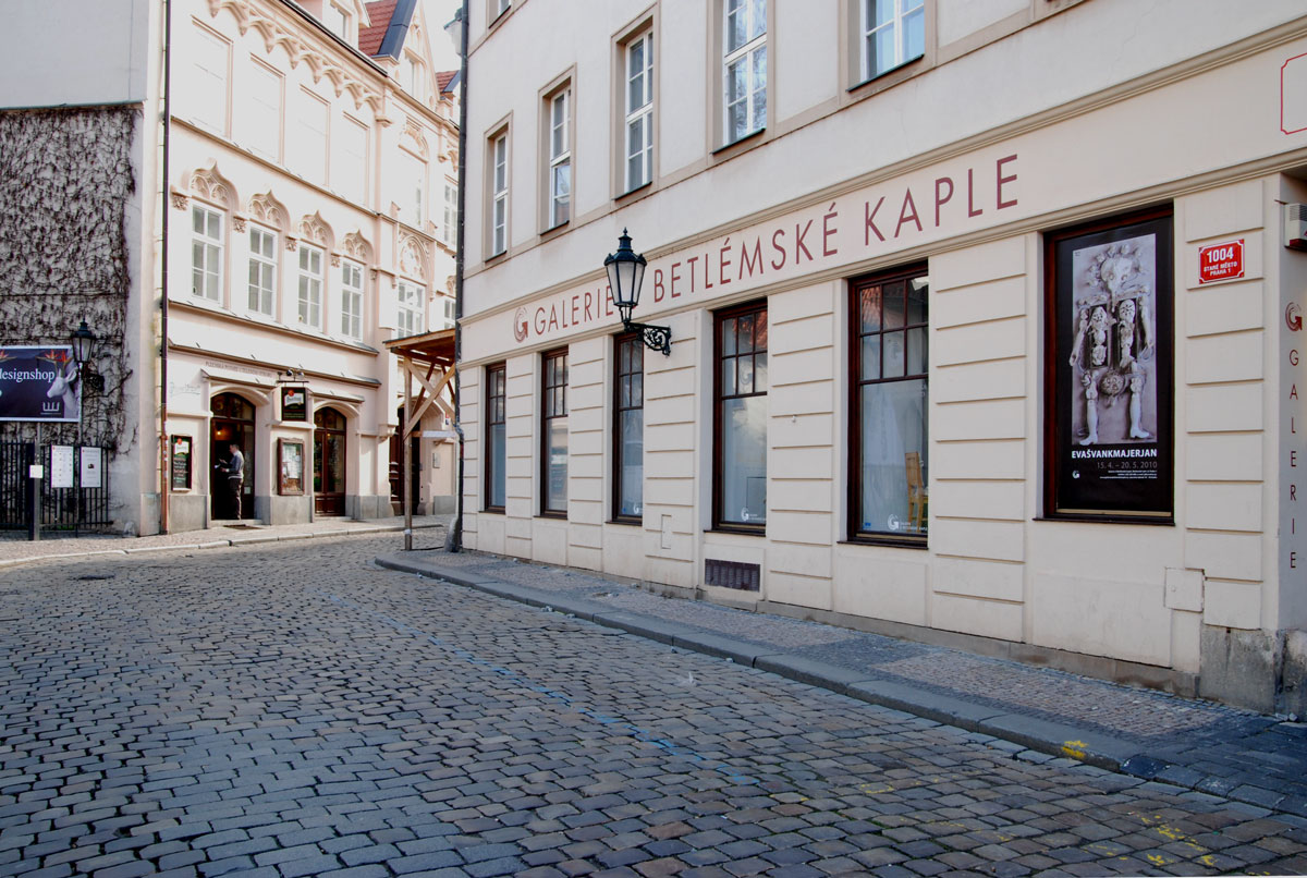 Galerie U Betlémské kaple